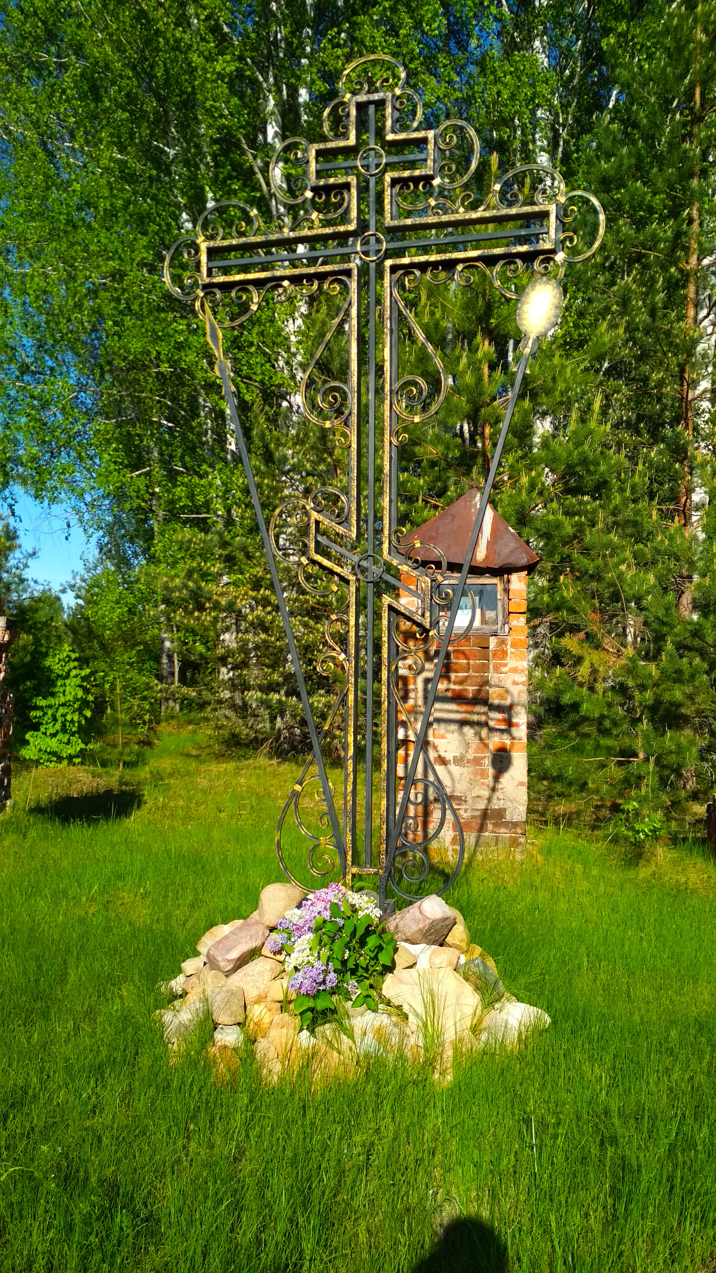 Памятный крест на урочище Курша (заброшенное село Курша (Успенское) установленный местными жителями в 2016 году рядом с разрушенными воротами Успенской церкви